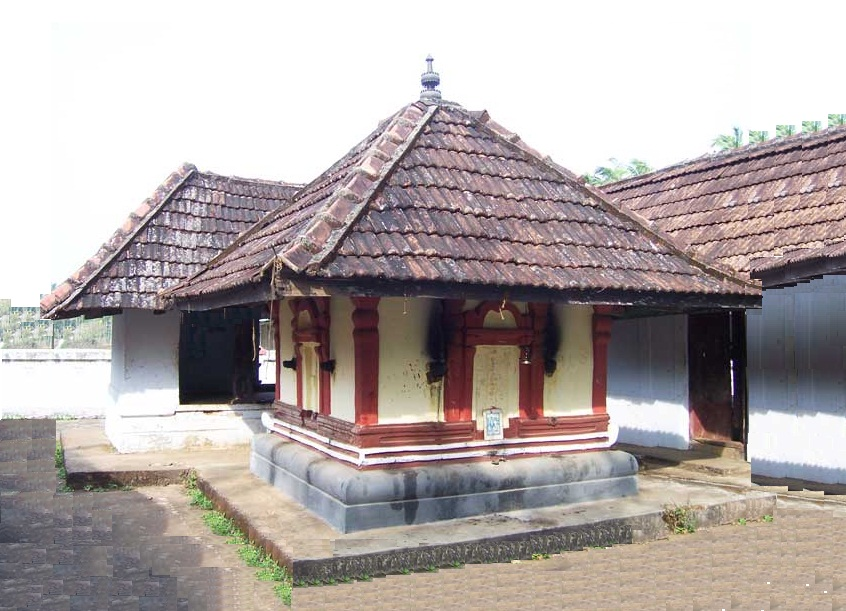 വീരണിമംഗലം ക്ഷേത്രം